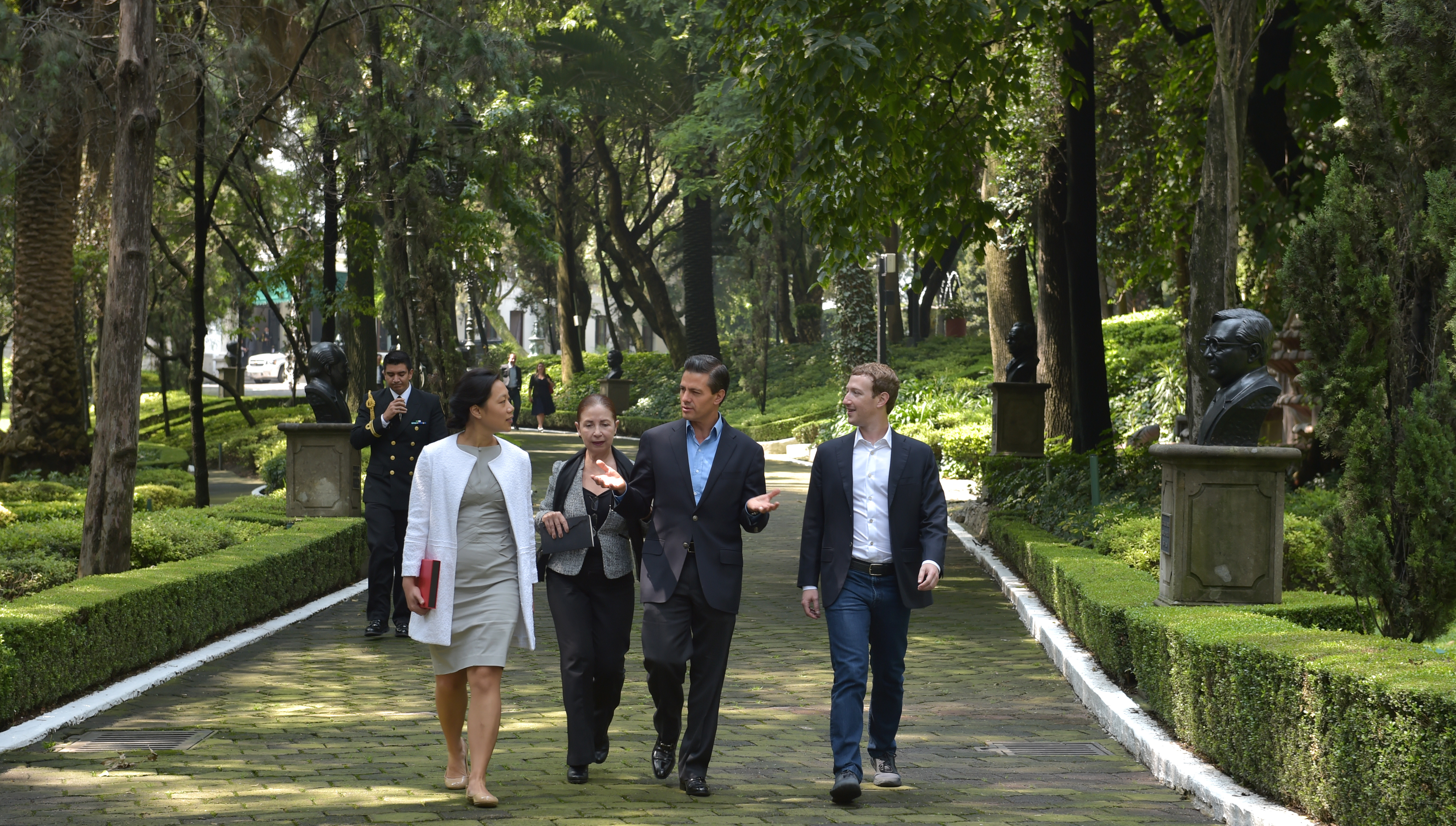 Visita de Mark Zuckerberg y su esposa a Los Pinos. Residencia Oficial de los Pinos, Ciudad de México. 5 de septiembre de 2014.